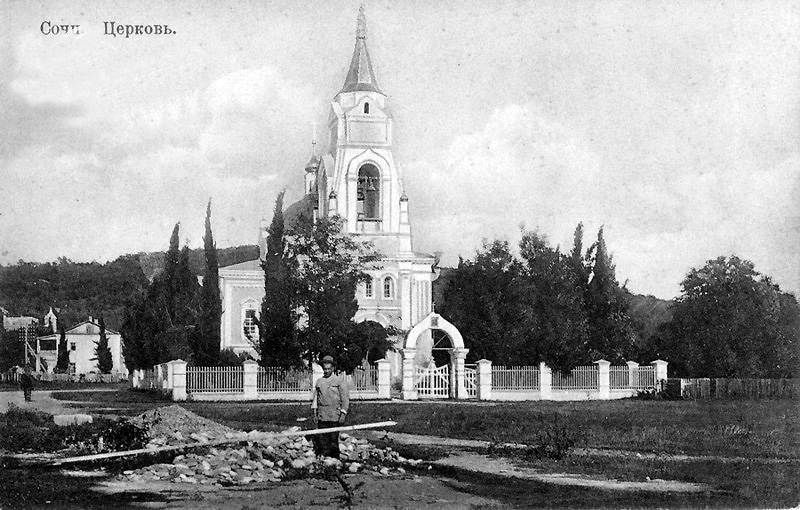 Церковь Сочи. Фото до 1917 года